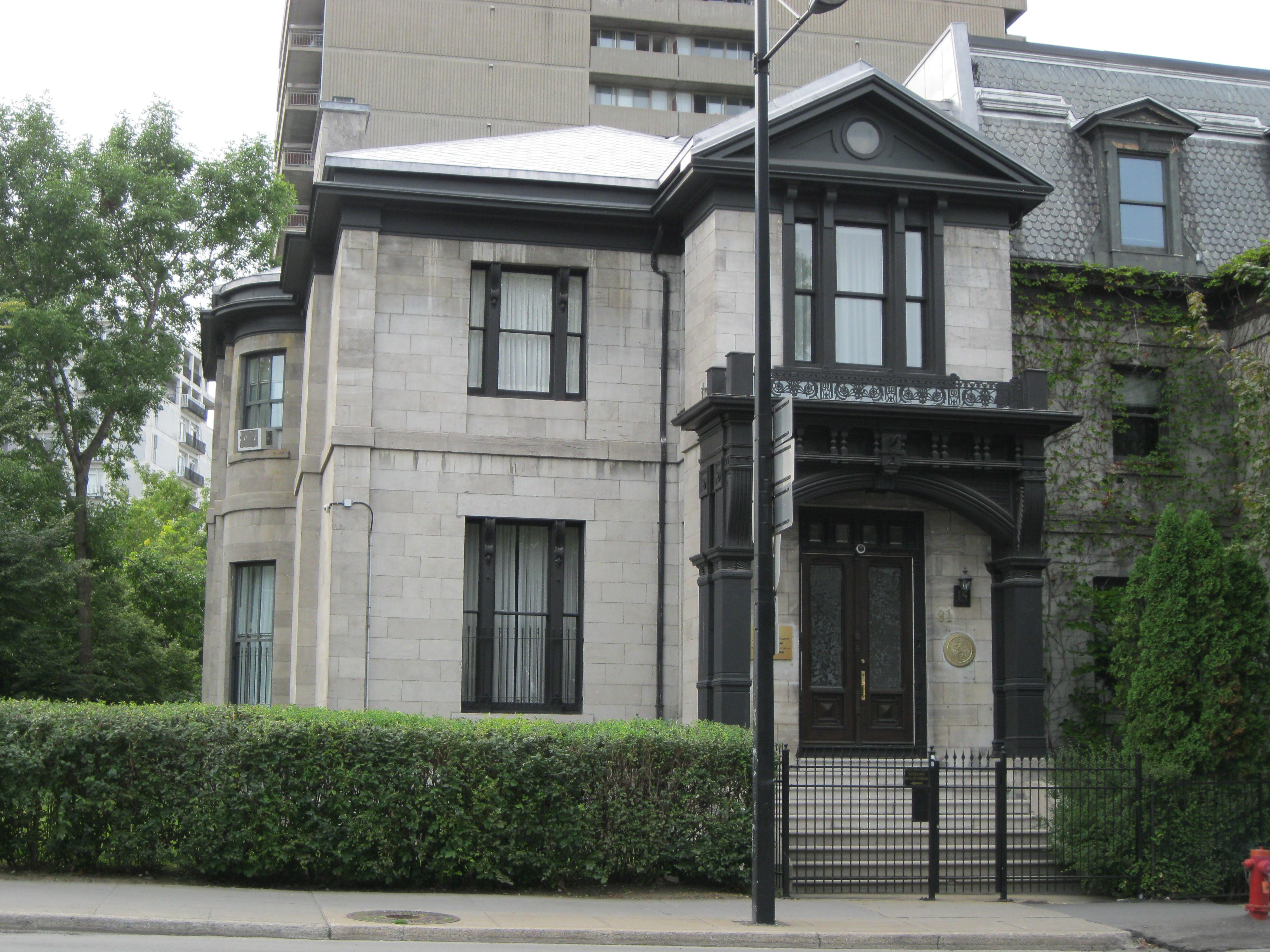 La maison Mackenzie-Brydges, classée monument historique, est une demeure bourgeoise en pierre de taille constituée de deux parties : la première (à l'est) d'esprit néoclassique érigée entre les années 1835 et 1846 et la seconde (à l'ouest) d'esprit victorien construite en 1867. Elle est située au 81, Rue Sherbrooke Ouest, dans l'arrondissement Le Plateau-Mont-Royal à Montréal.